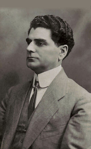 Professor Gheorghe Taşcă in 1913